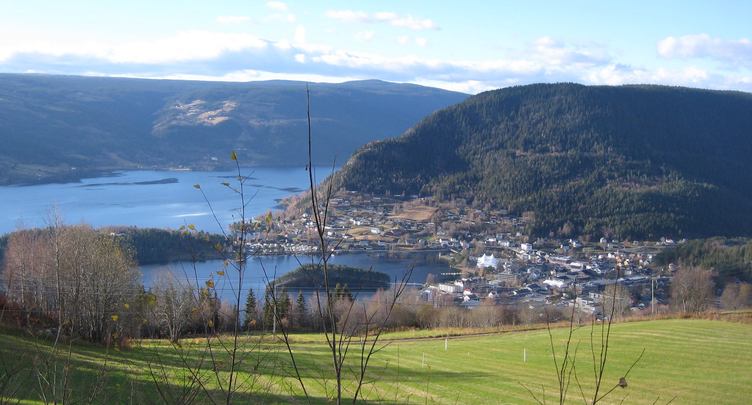 Fagernes med Strandefjorden.